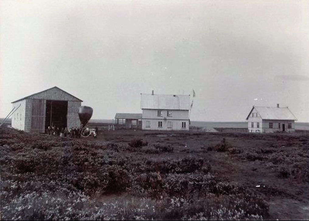 Ballonstationen på Stanghede 1902